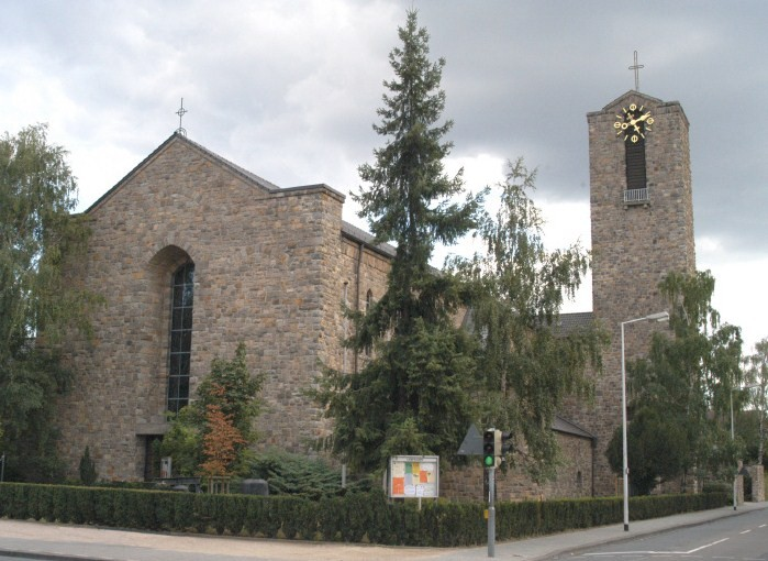 Liebfrauenkirche, Darmstadt-Bessungen, aufgenommen von der Klappacher Straße aus nordwestlicher Richtung